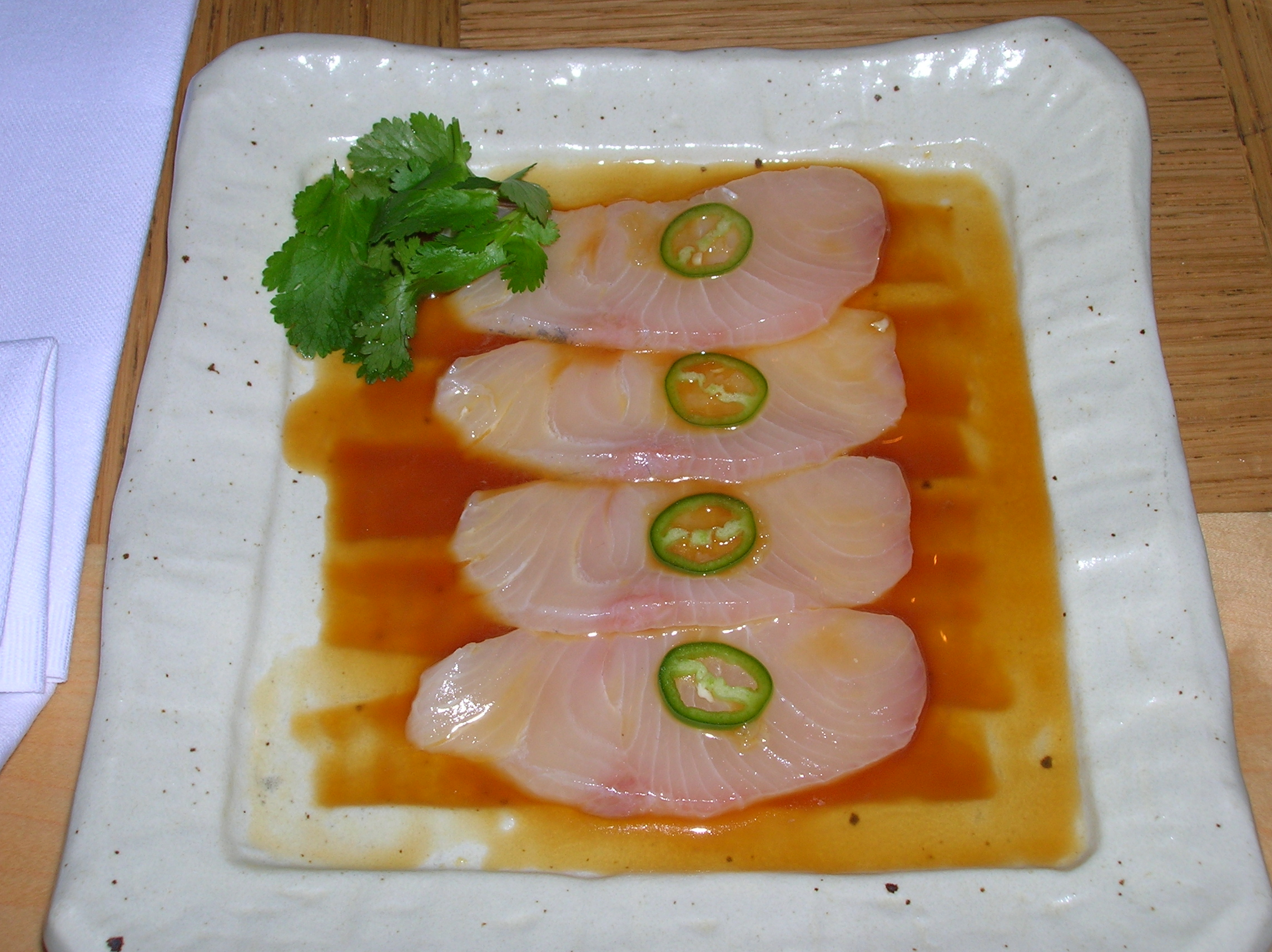 ילוטייל סשימי עם ג'לאפנו